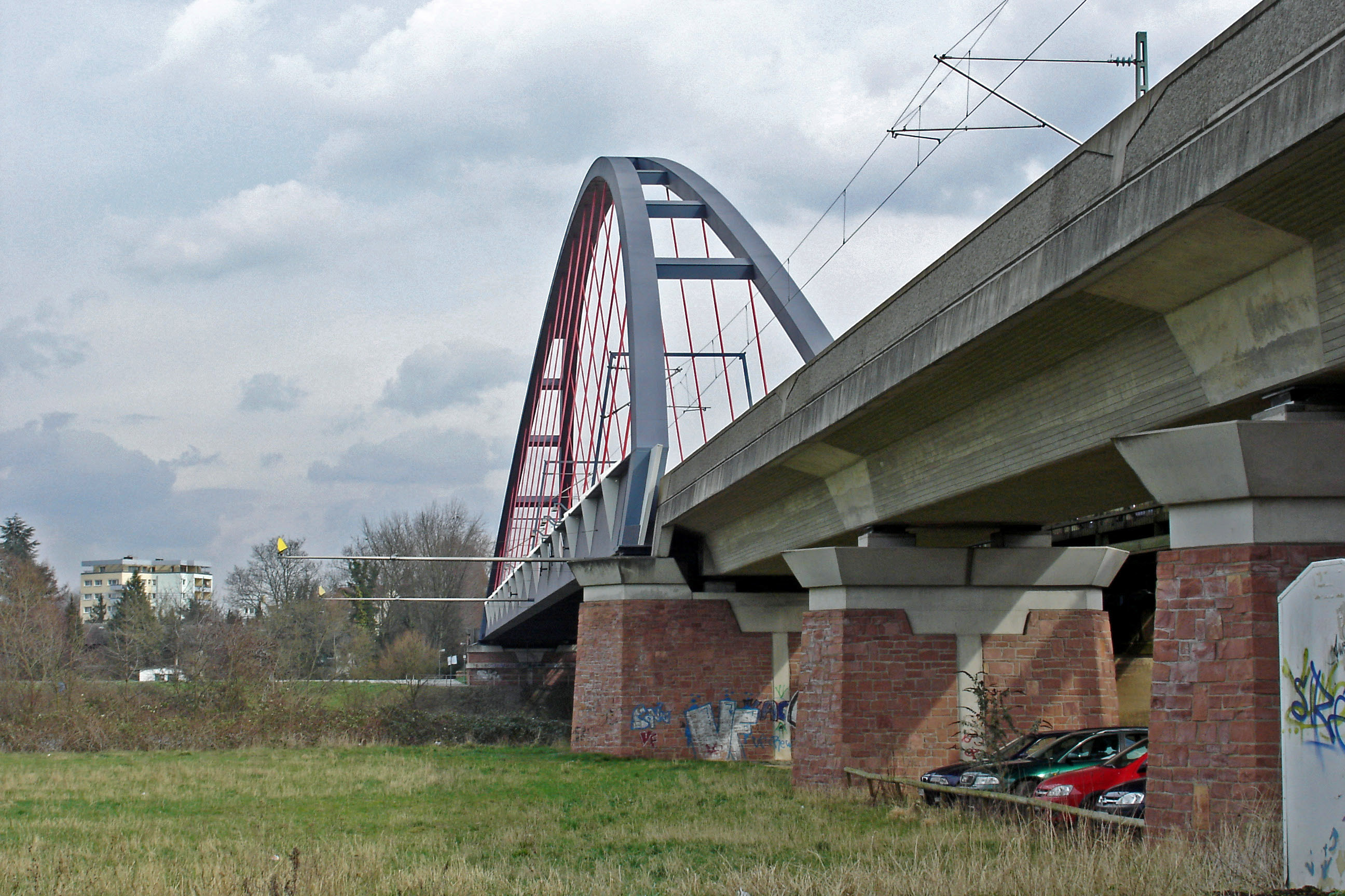 Steinheimer Bruecke (Bahnseite) vom suedlichen Steinheimer Ufer aus